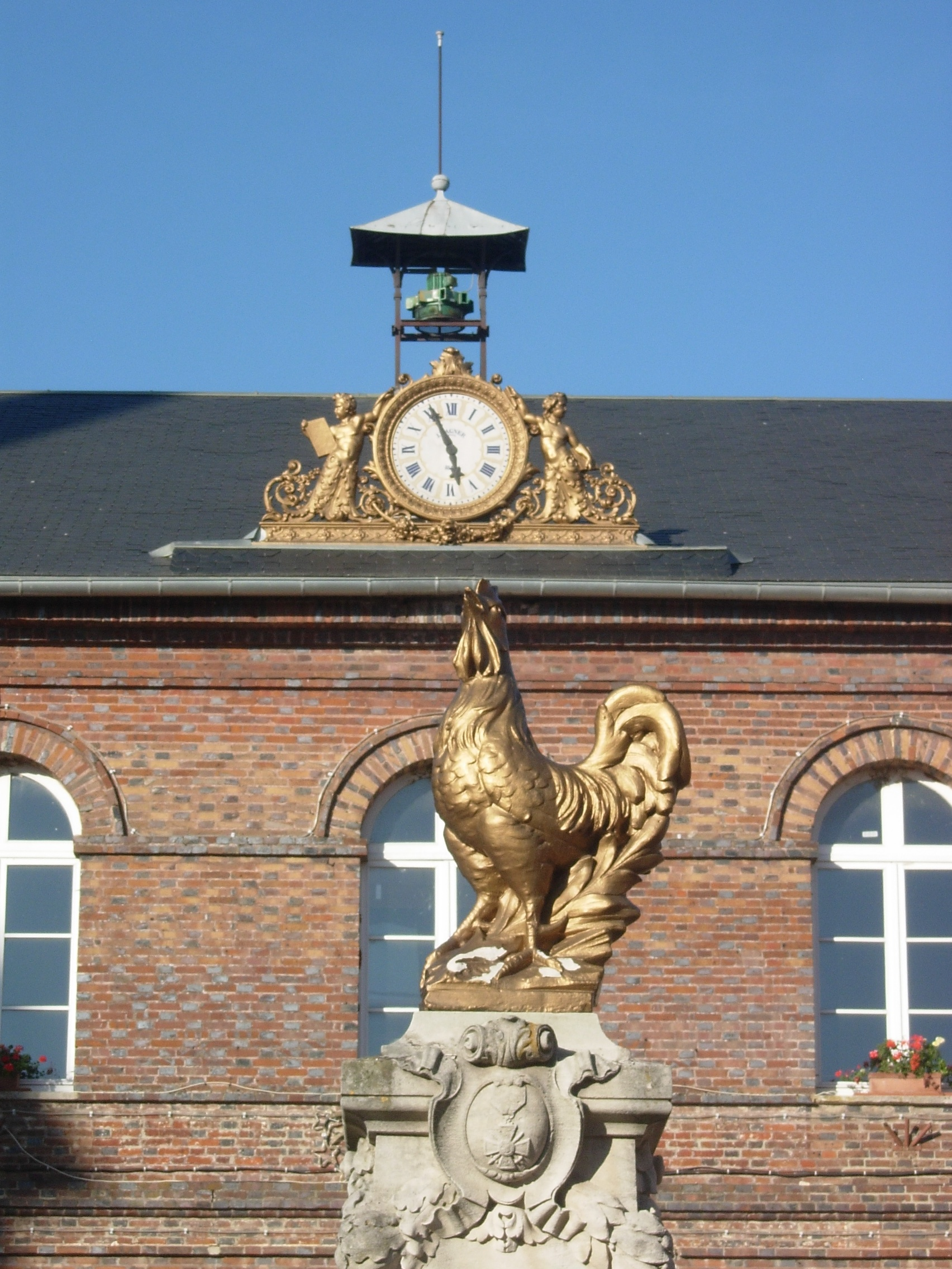 Rigny-le-Ferron (Aube)